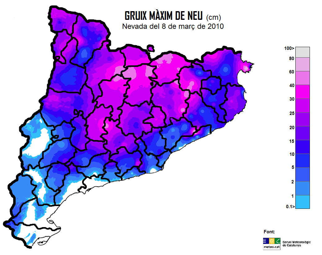 Mapa amb els diversos gruixos de neu que es van acumular en gran part de la superfície de Catalunya.